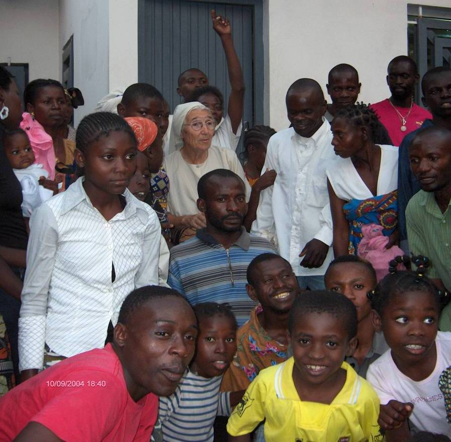 Cérémonie de départ de Sœur Marguerite - Brazzaville, septembre 2004